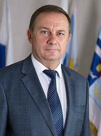 Прасолов В.А.